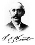 Portrait autographié de Seth Carlo Chandler, Jr. (1846–1913) A cause de l'ancienneté du portrait et de la date de la mort de Chandler, cette illustration se trouve dans le domaine public.